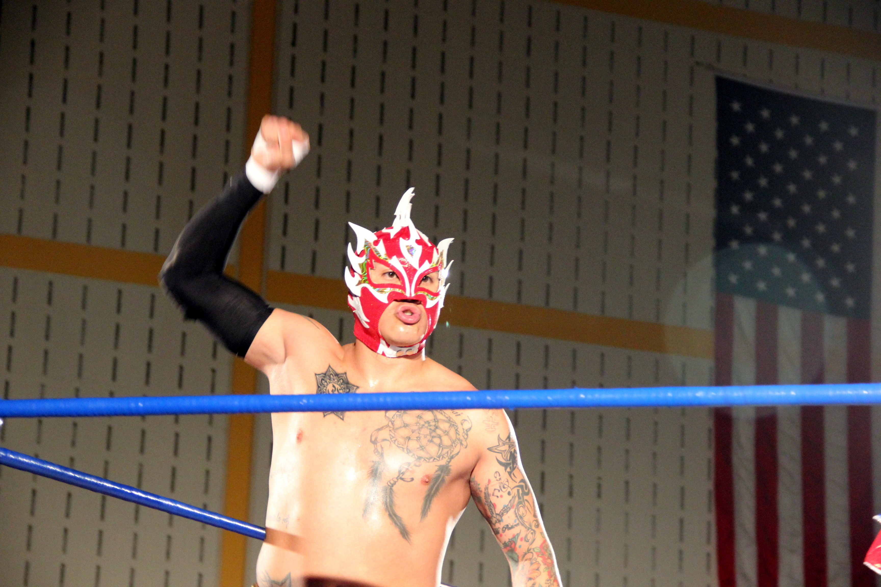 Fénix en septembre 2015